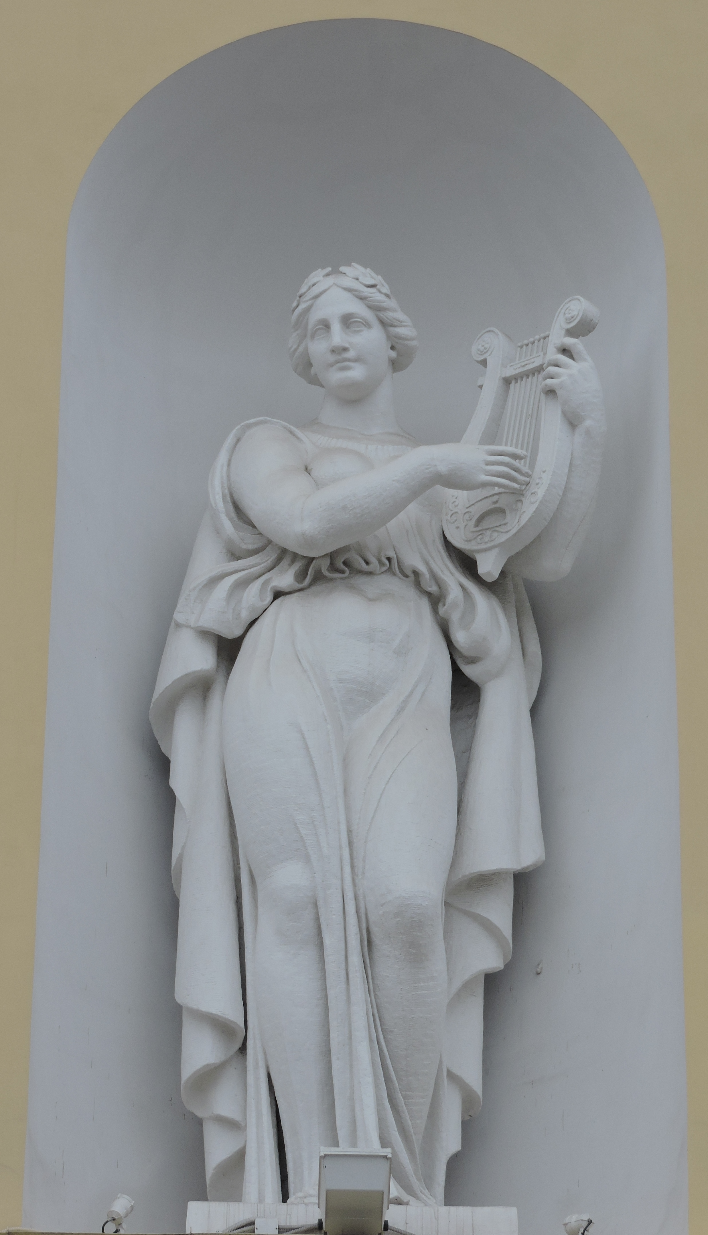 Муза с арфой (Александринка)